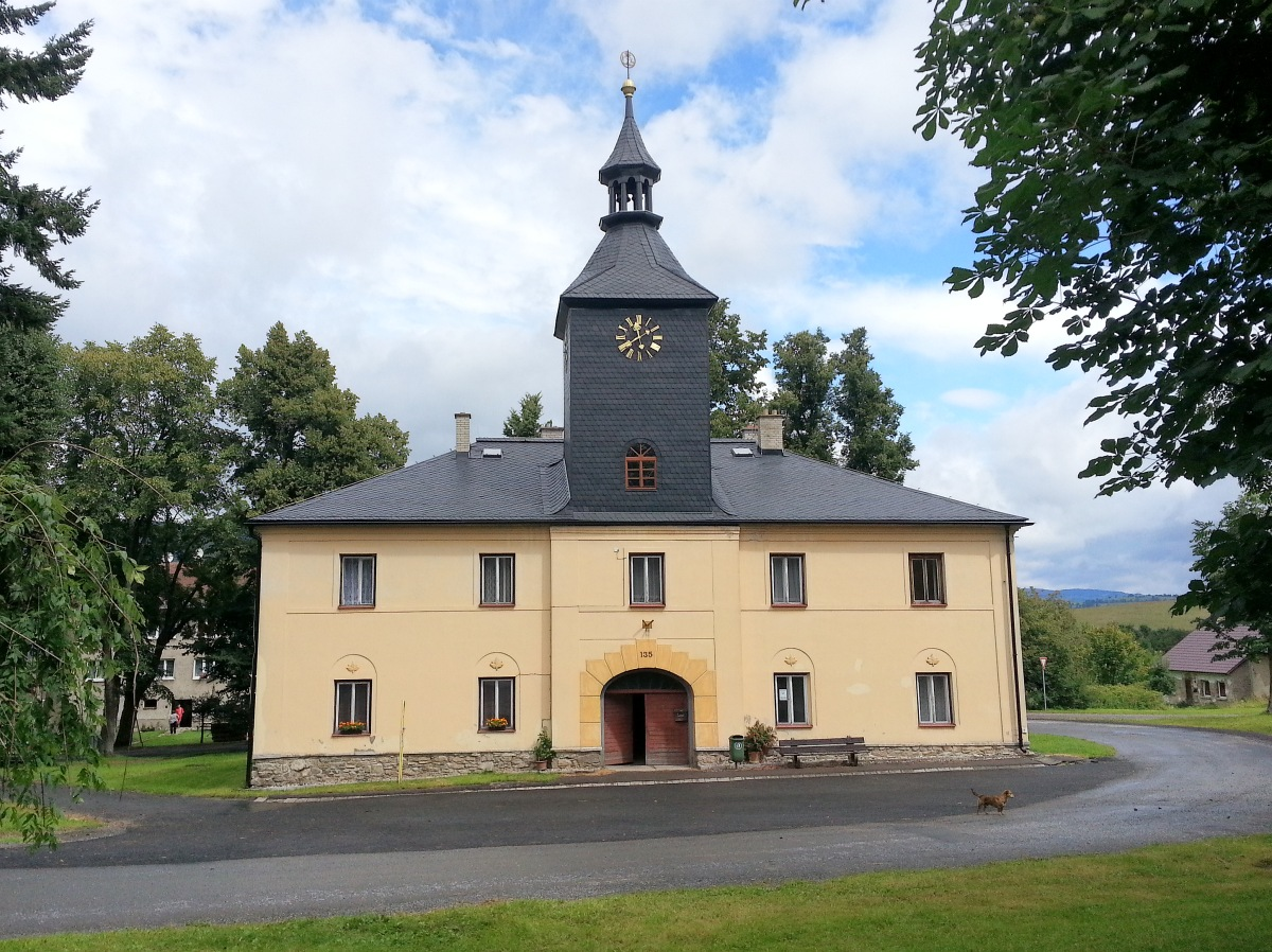 Podlesí, Malá Morava - radnice